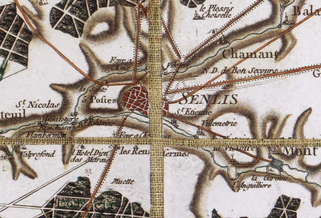 Senlis (France) - Carte de Cassini, vers 1780